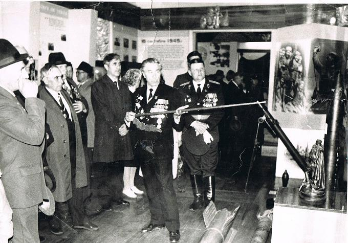 В музее боевой славы 9 мсд. Командир дивизии полковник Дорофеев А.А., и пластун артиллерийст капитан Тарасенко М Н.. Майкоп 1988.